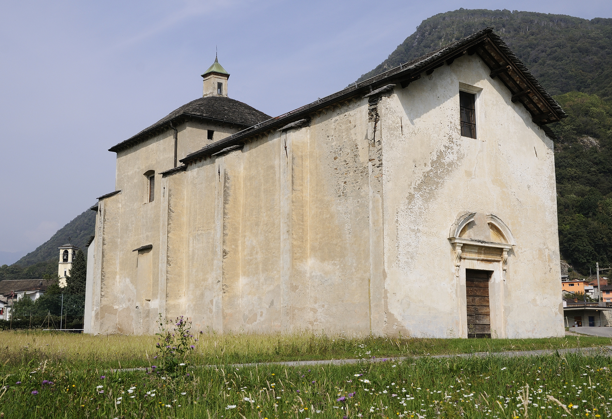 Chiesa Santa Maria del Rosario - Bironico Monteceneri